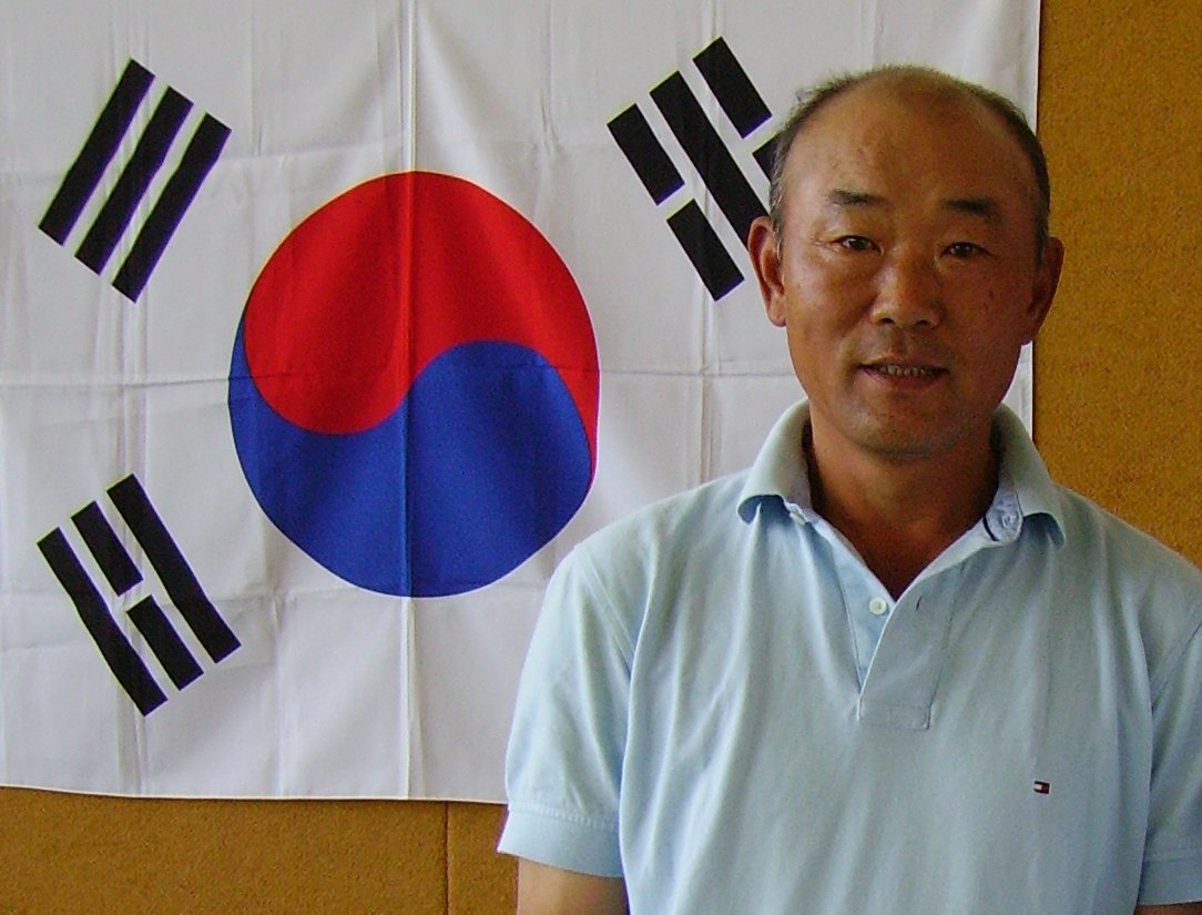 Großmeister Kim Chul-Hwan fotografiert am 18.06.2006 beim Lehrgang der Han Kook Taekwondo Family in Bad Düben durch Detlef Chabierski, veröffentlich von E.Dickert